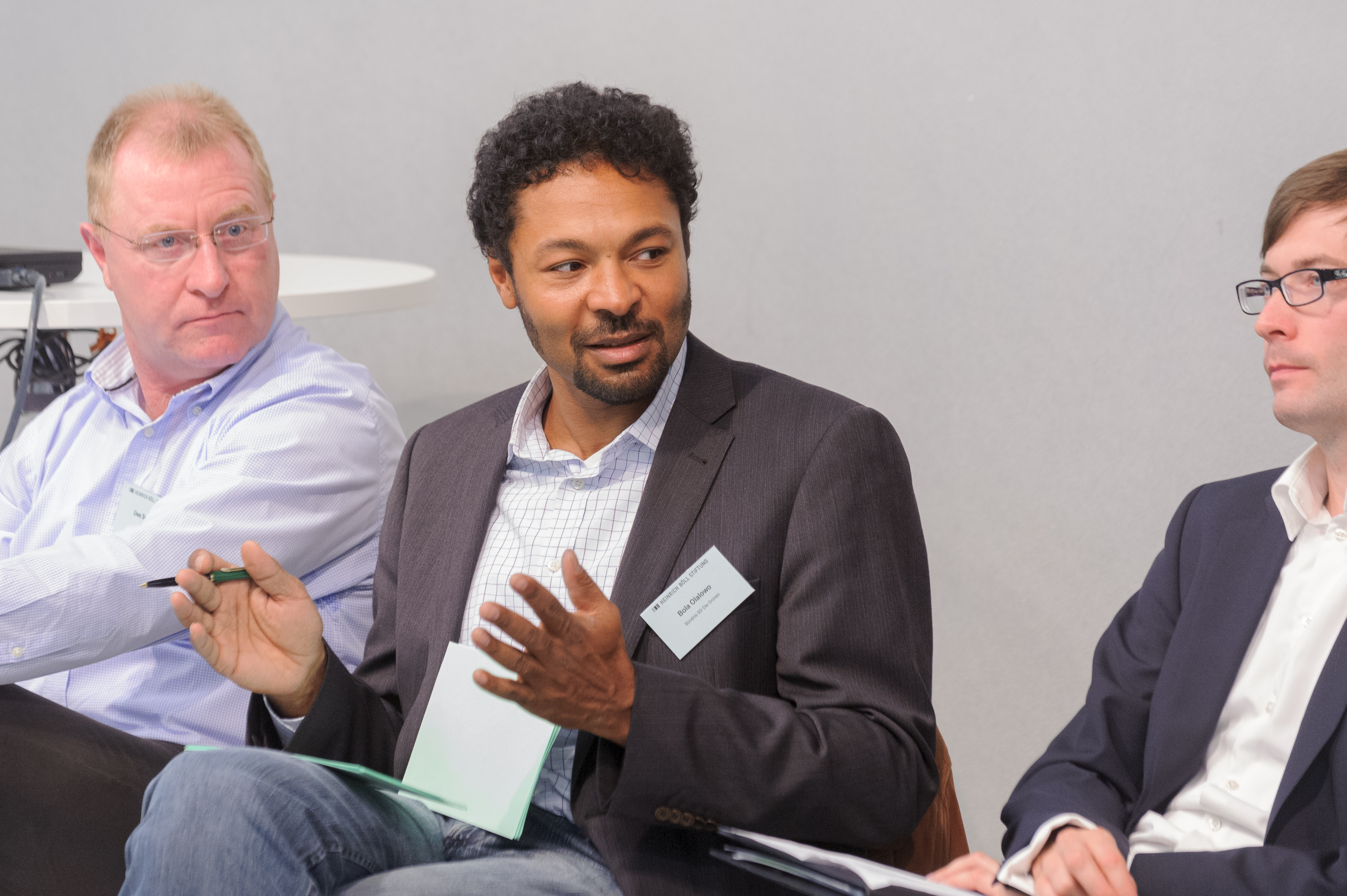 Uwe Schmorl (Betriebsrat bei Q-Cells in Bitterfeld), Moderation: Bola Olalowo (MdA, Bündnis 90/ Die Grünen. Sprecher für Wirtschaftspolitik der Fraktion im Berliner Abgeordnetenhaus), Frederik Moch (Energiereferent beim DGB, Abteilung Industrie-, Dienstleistungs- und Strukturpolitik) Konferenz: Grüne Jobs, faire Jobs. Arbeitnehmerrechte in der Wind- und Solarbranche Foto: Stephan Röhl (